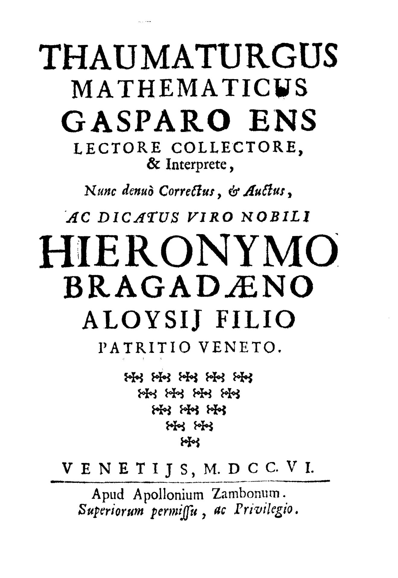 Thaumaturgus mathematicus Gasparo Ens lectore collectore, & interprete, .... - Venetijs : apud Apollonium Zambonum, 1706. - [8], 302, [18] p. : ill. ; 8º .